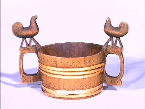 Staup fra Balestrand, Sogn og Fjordane. Diameter 18 cm. Norsk Folkemuseum, NF.1992-0692